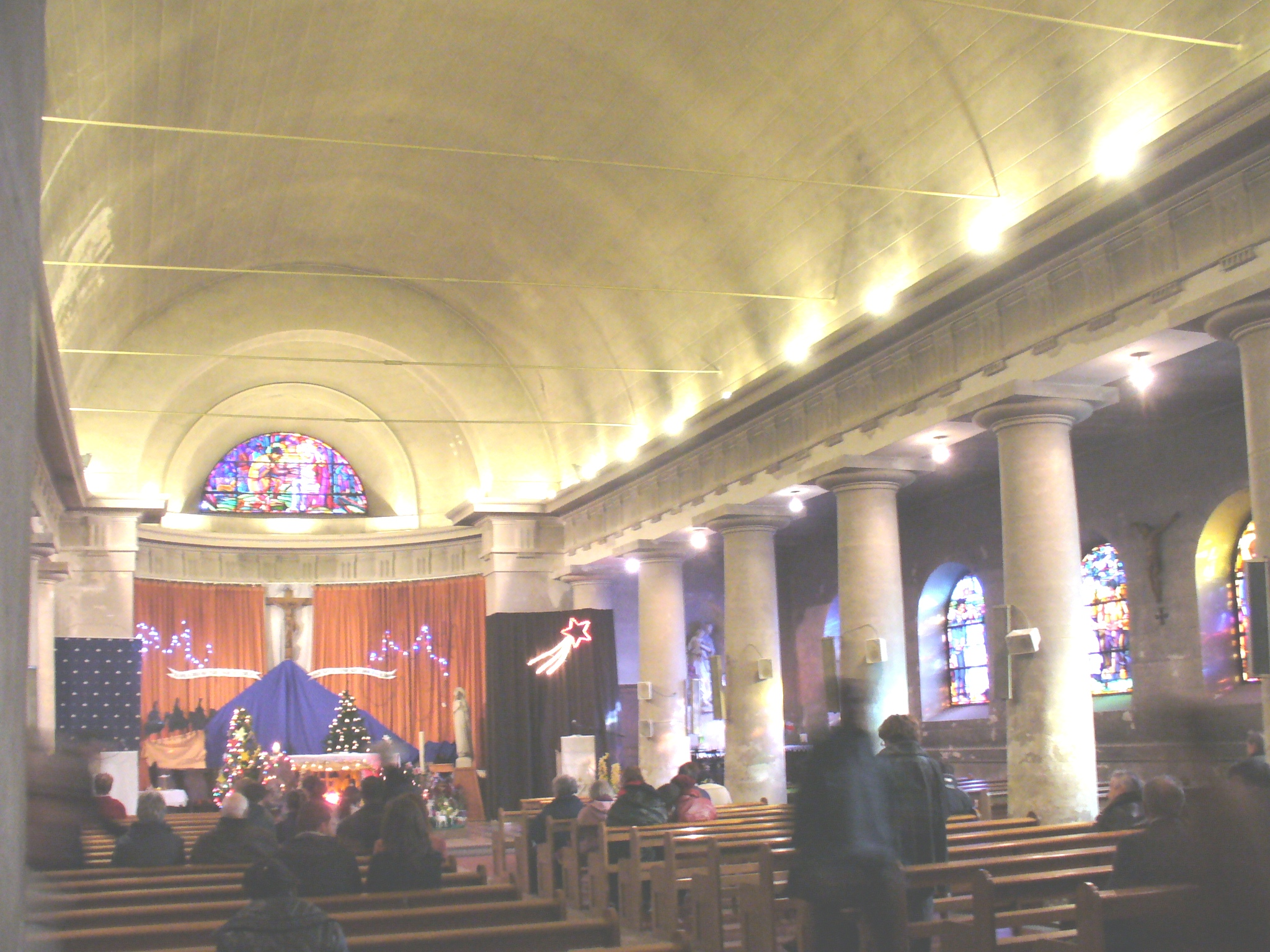 Eglise de Romainville (Seine-Saint-Denis) intérieur